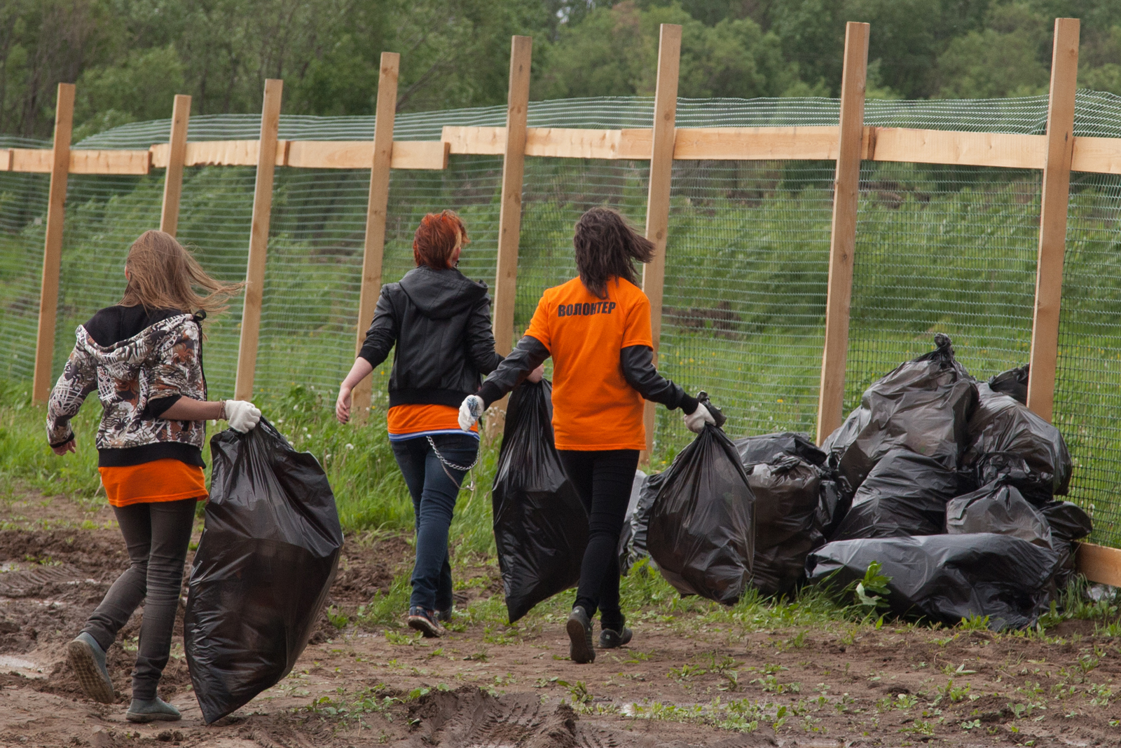 Волонтёры Рок-фестиваля Остров (город Архангельск). Организатор - концертное агентство «Орландина»